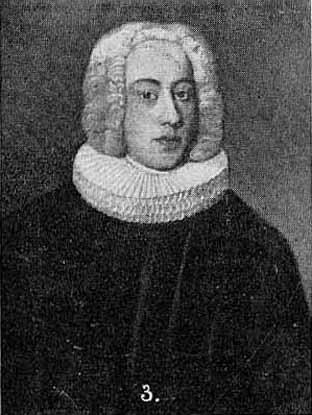 Maleri av Rasmus Paludan - portrett fra sakristiet i Kristiansand domkirke